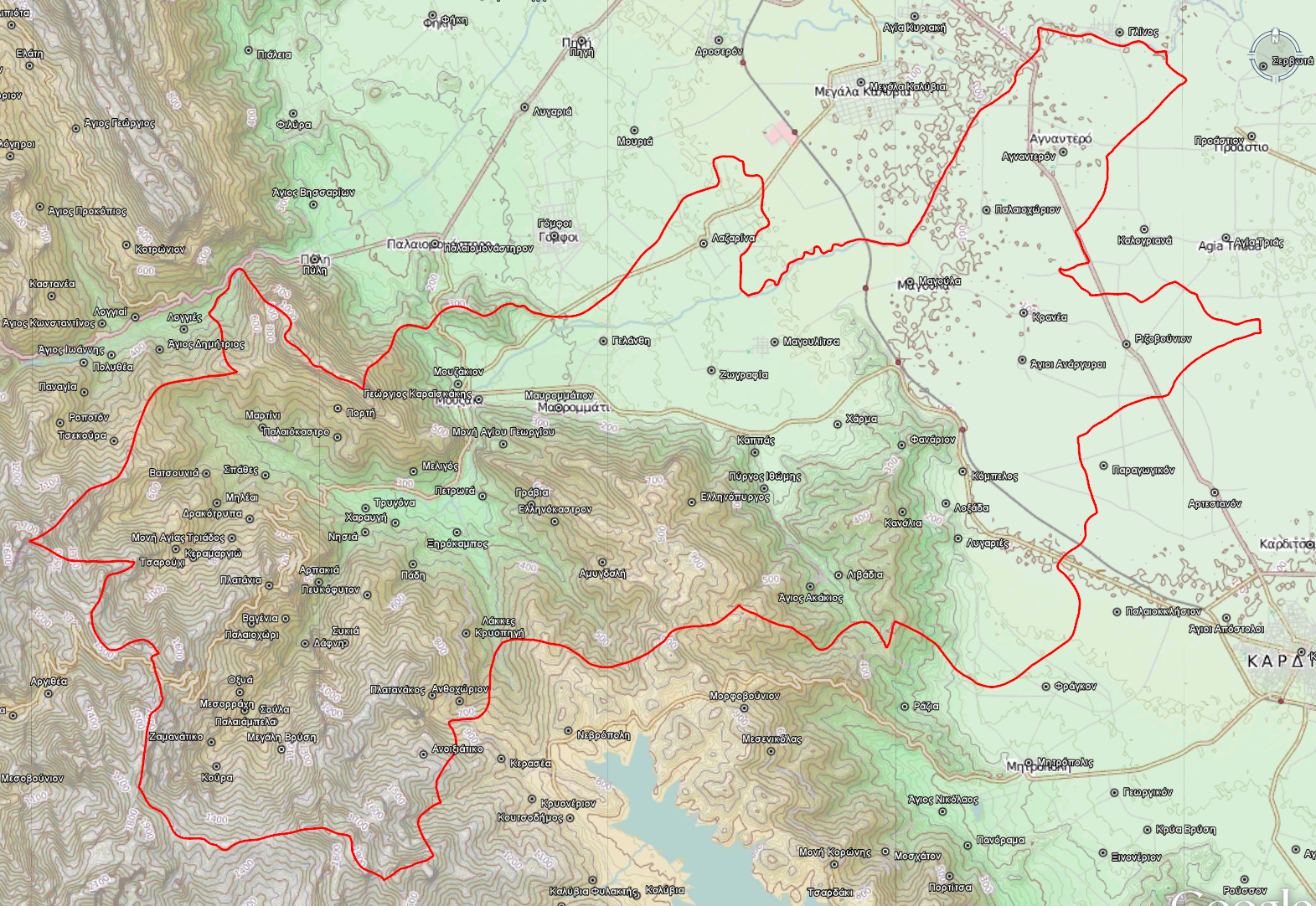 Τοπογραφικός χάρτης του Δήμου Μουζακίου